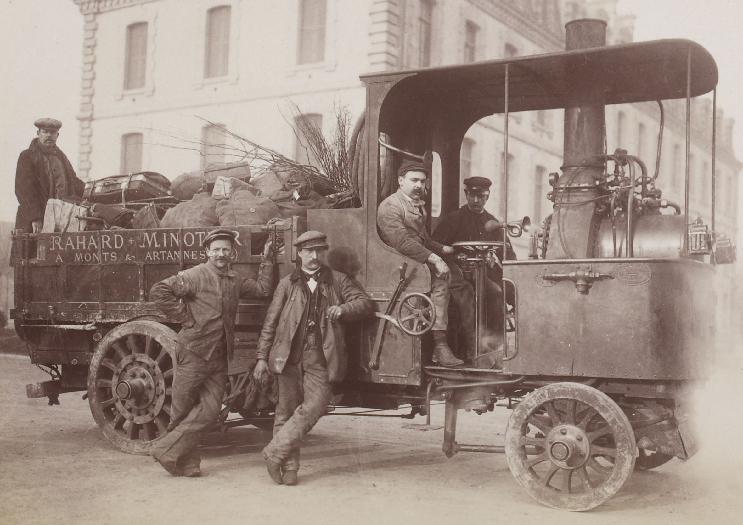 [Collection Jules Beau. Photographie sportive] : T. 16. Années 1901 et 1902 / Jules Beau : F. 43v. [Caravane des poids lourds, Paris - Monte-Carlo, 26 mars 1902]